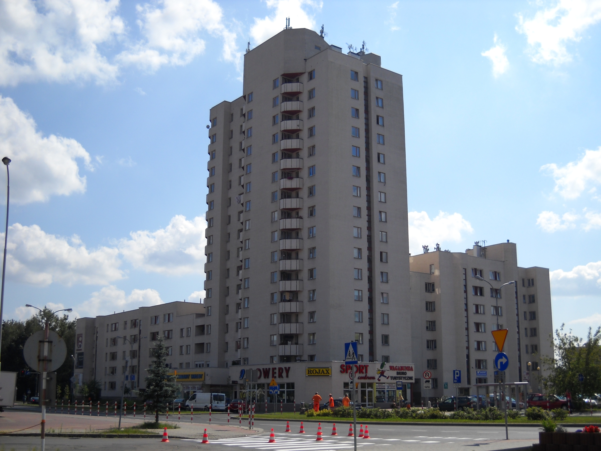 Najwyższy budynek mieszkalny w mieście tzw "Szesnastka"